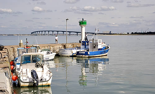 Le port de Rivedoux-Plage à marée haute, en arrière plan de pont de l'îŽle de Ré. Cette image et issue de ma banque d'images personnelle